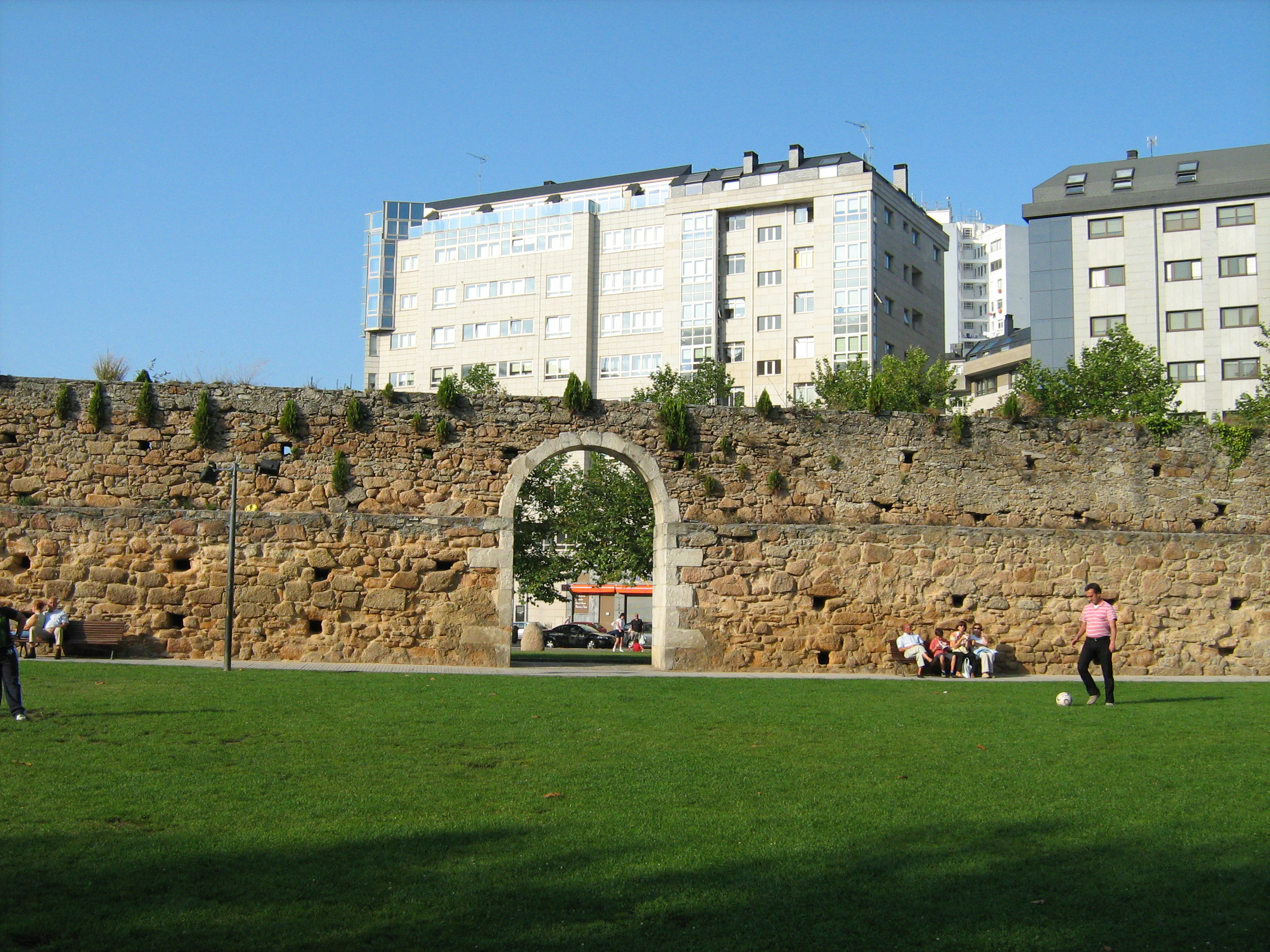 Acueduto do Paseo das Pontes, na Coruña